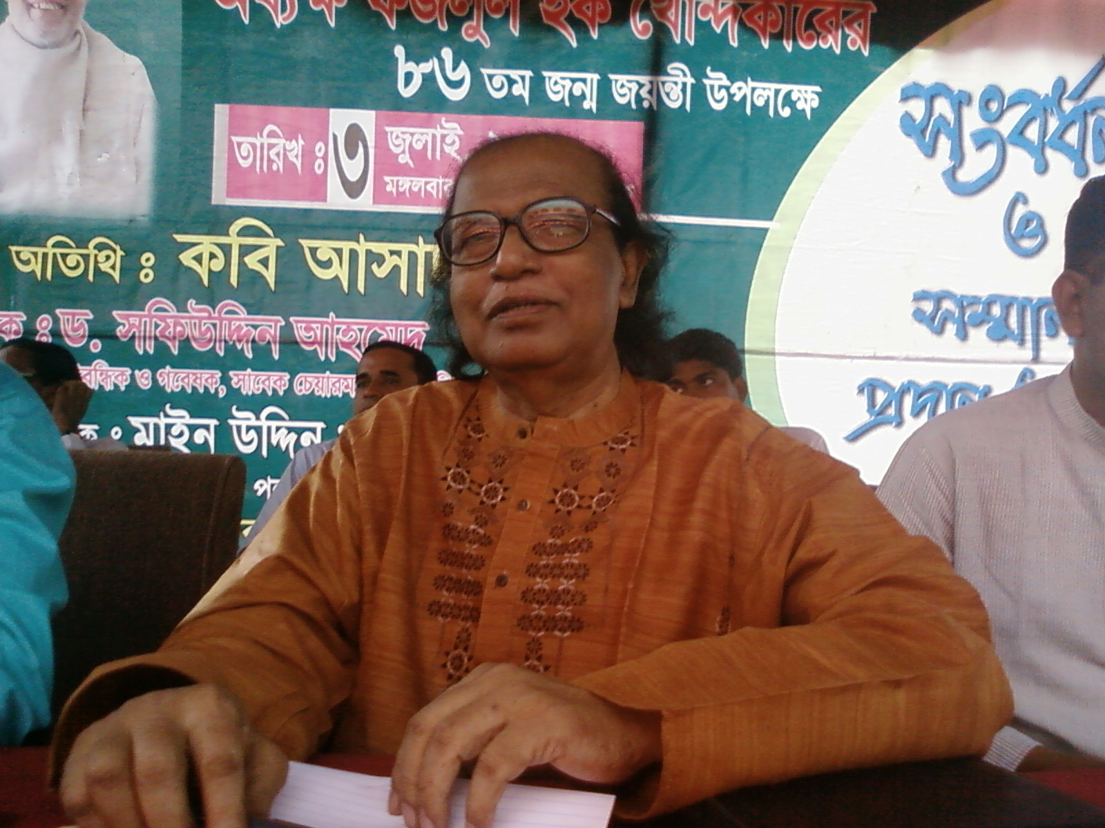 ফজলুল হক খোন্দকারের ৮৬তম জন্মবার্ষিকী অনুষ্ঠান